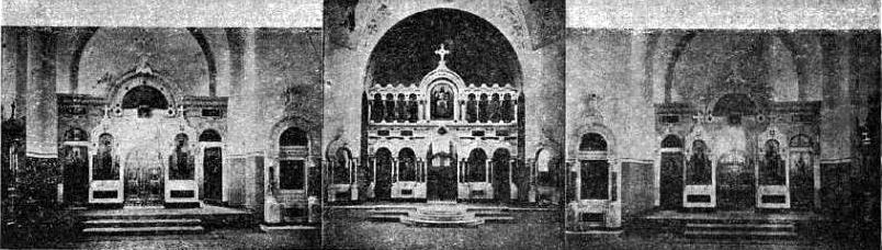 Ростов на Дону, бывшая ст. Александровская. Церковь Сретения Господня. Иконостас